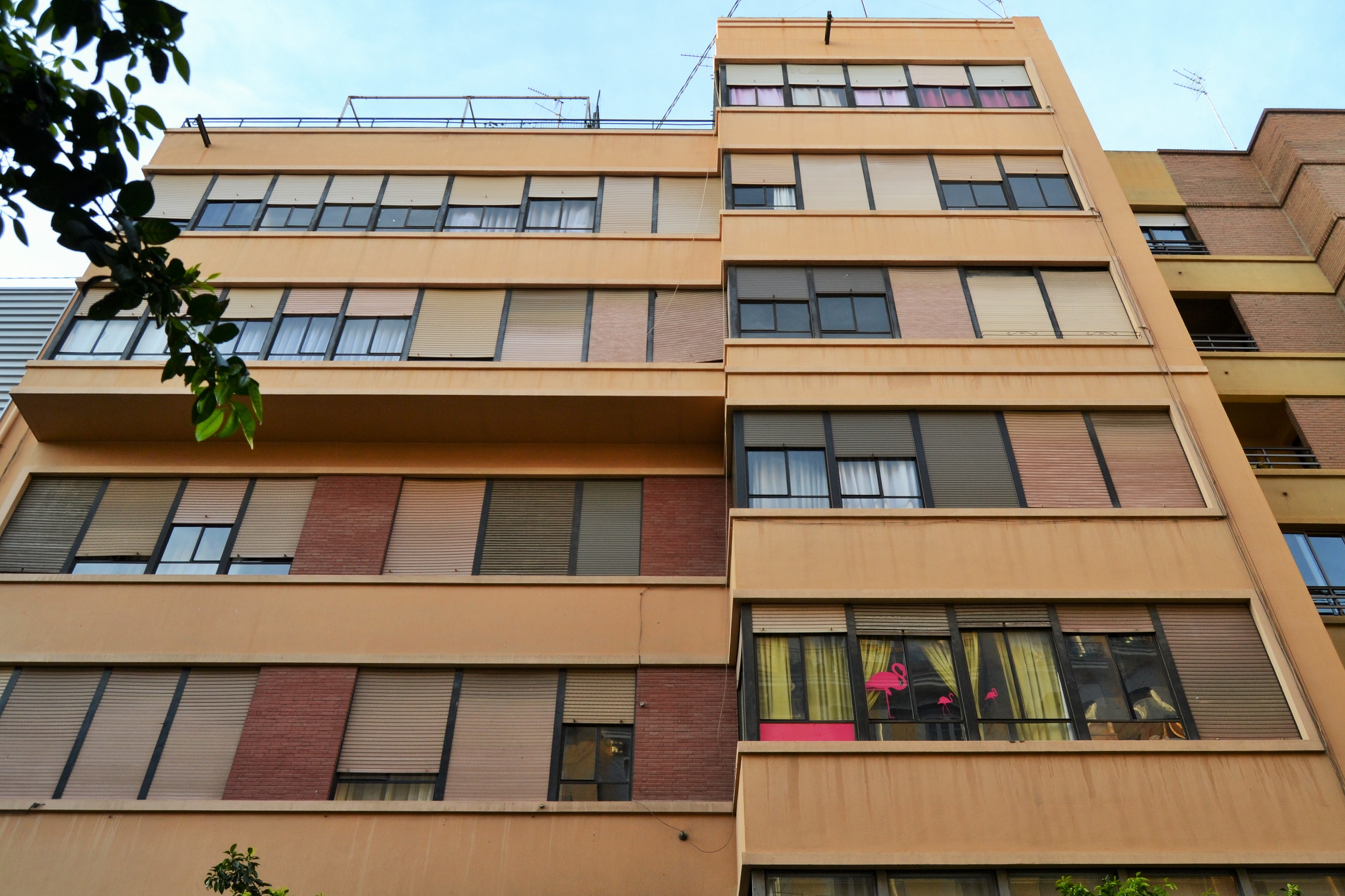 Façana de l'edifici Buch de València.